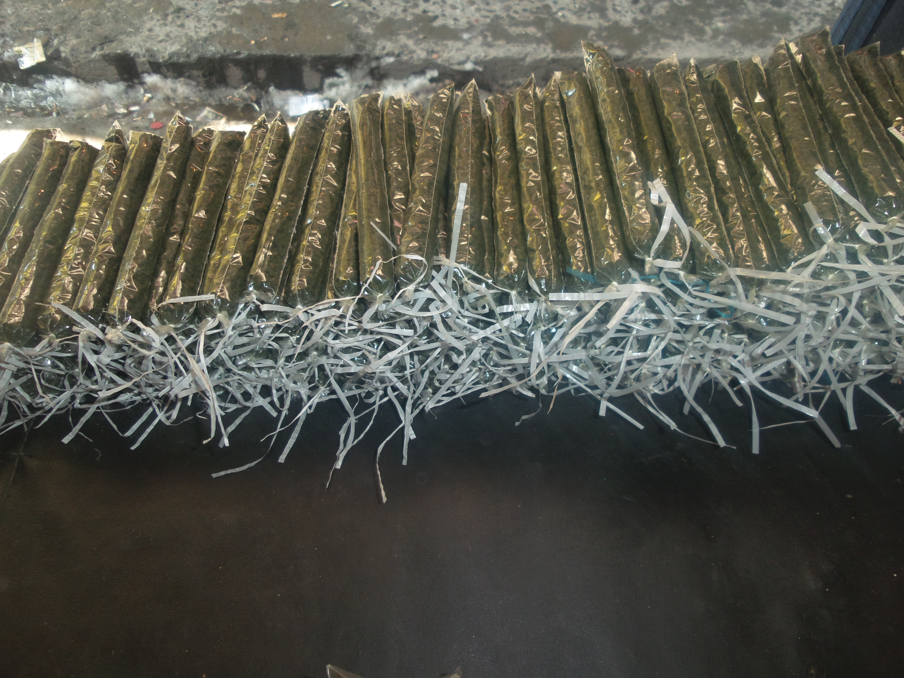 Oʻzbekcha/ўзбекча: Нос тамаки махсулоти